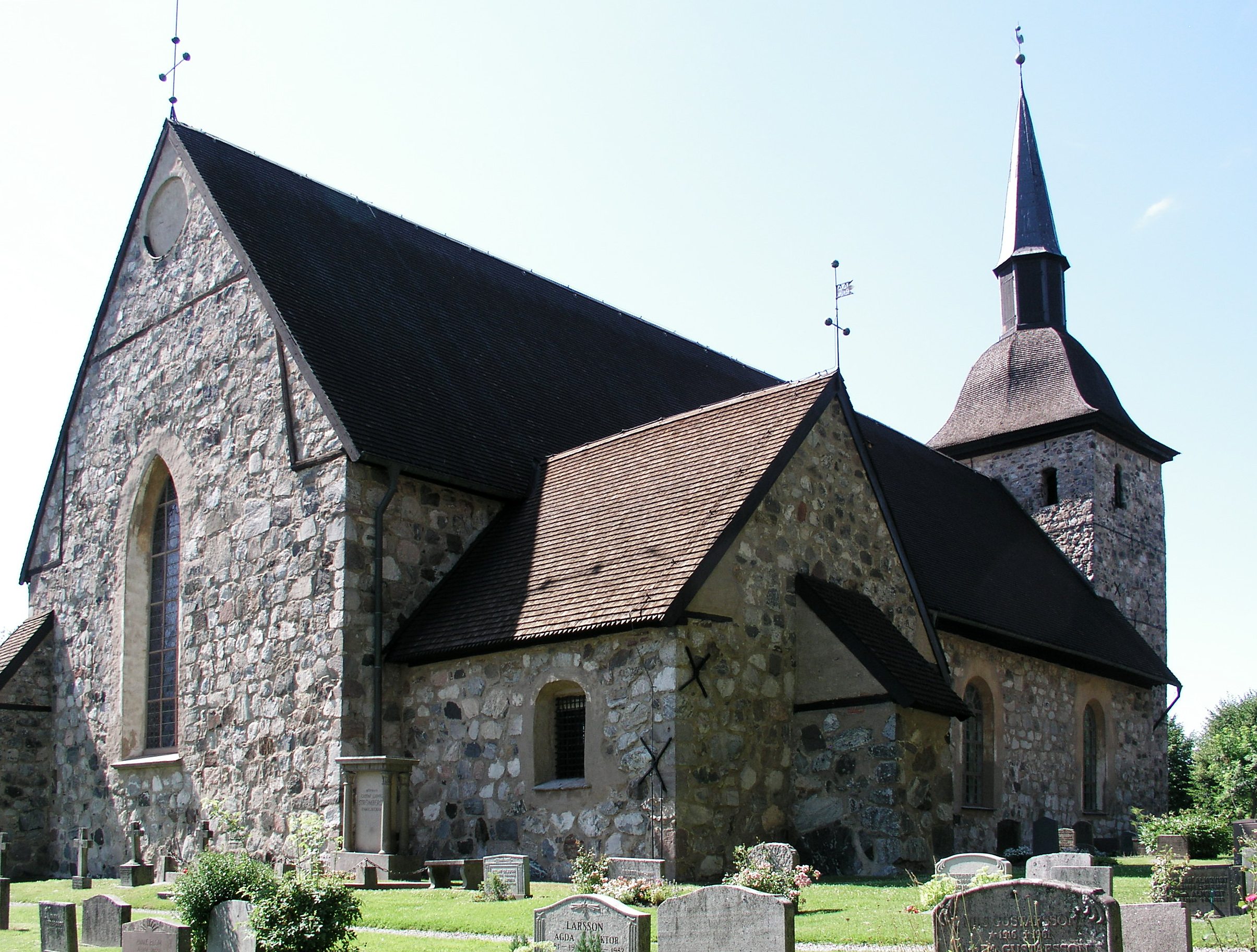 Botkyrka kyrka / Botkyrka church. Diocese of Stockholm, Botkyrka kommun